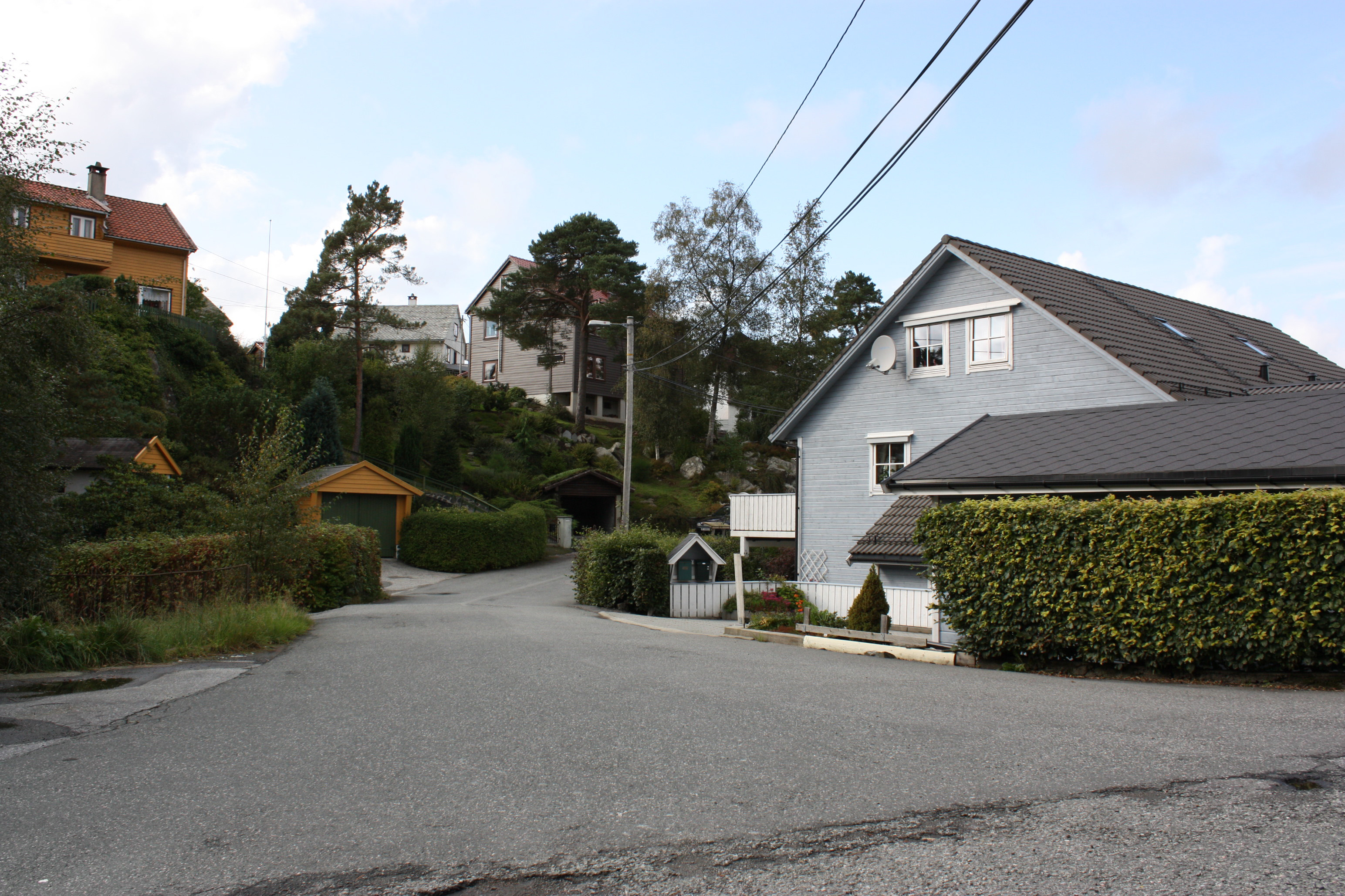 Balders veg, Fana, Bergen.